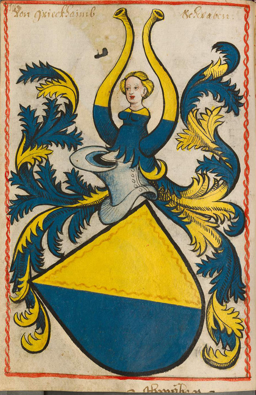 Scheibler'sches Wappenbuch, älterer Teil; Seite 116 Von Grieckhaimb Schwaben